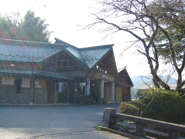 日田彦山線筑前岩屋駅 駅舎 2006年3月 Bakkai撮影